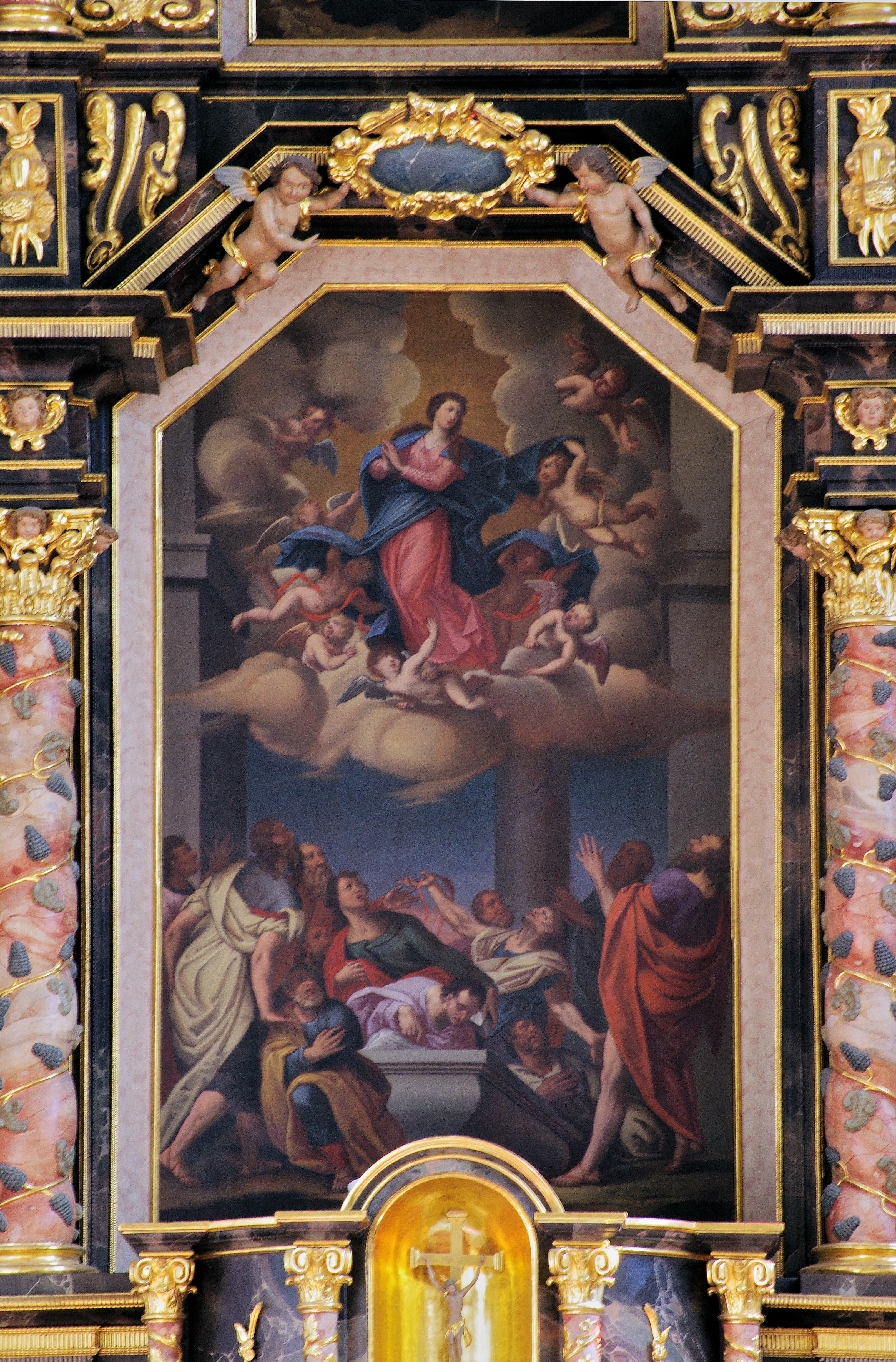 Das Gemälde „Aufnahme Mariens in den Himmel“ von Johann Caspar Brenzinger.